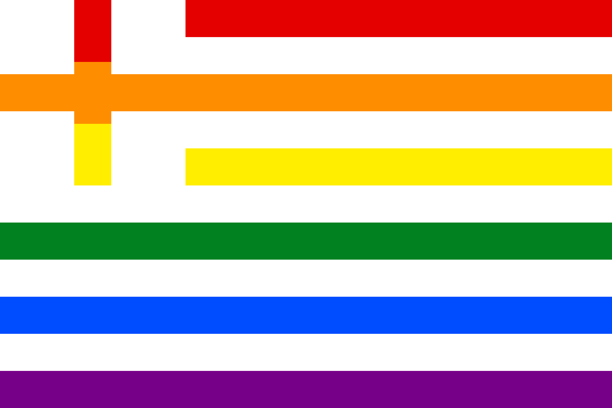 Bandera gay Grecia.